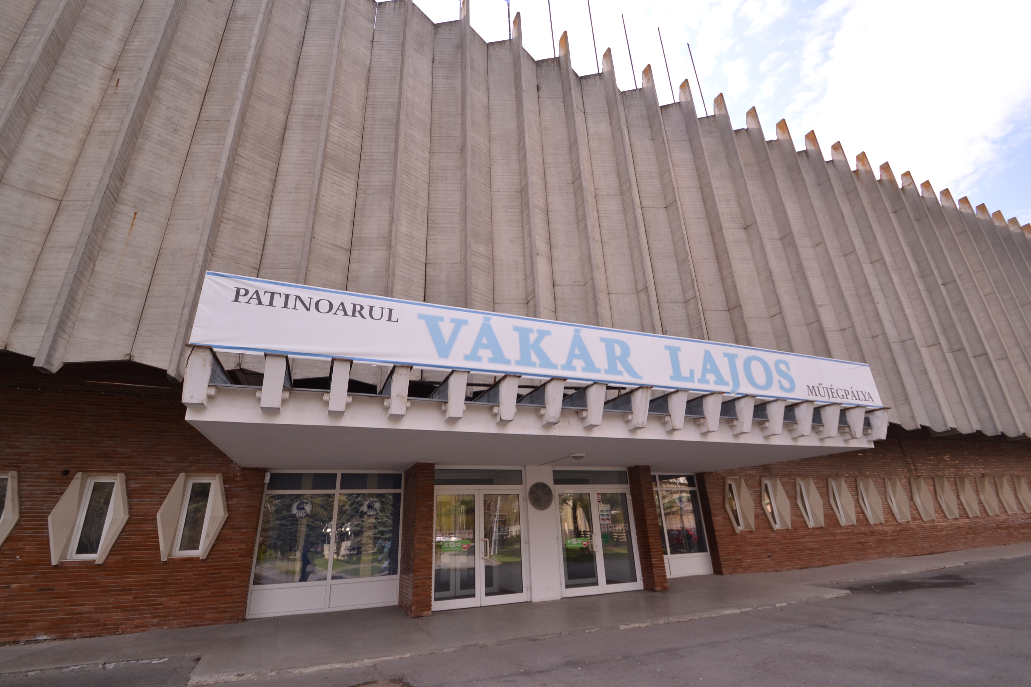 jégpálya